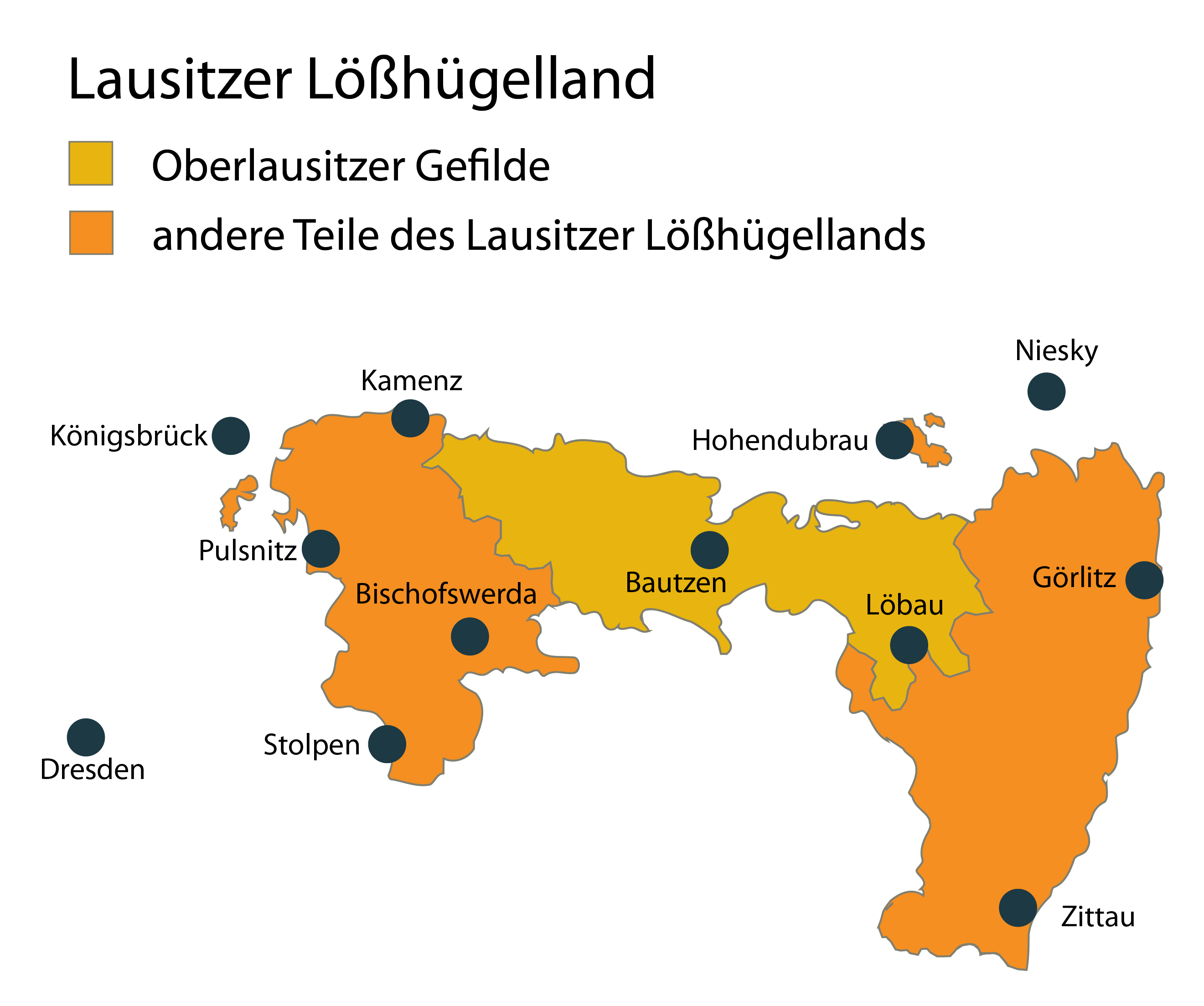 die Landschaft Oberlausitzer Gefilde im Landschaftsaum Lausitzer Loesshuegelland in Sachsen, Deutschland